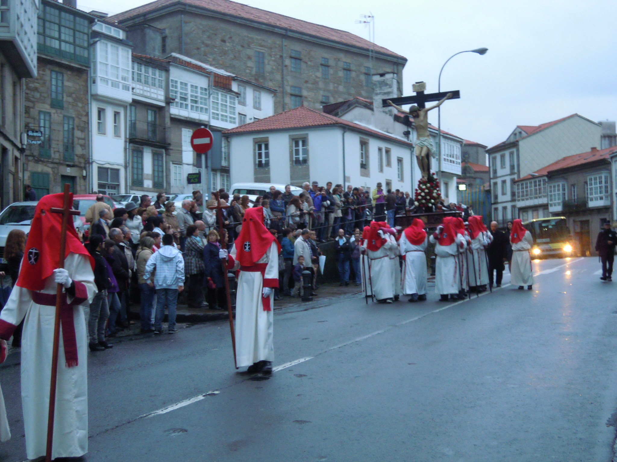 Procesión en Santiago de Compostela o Martes Santo, na rúa da Virxe da Cerca.